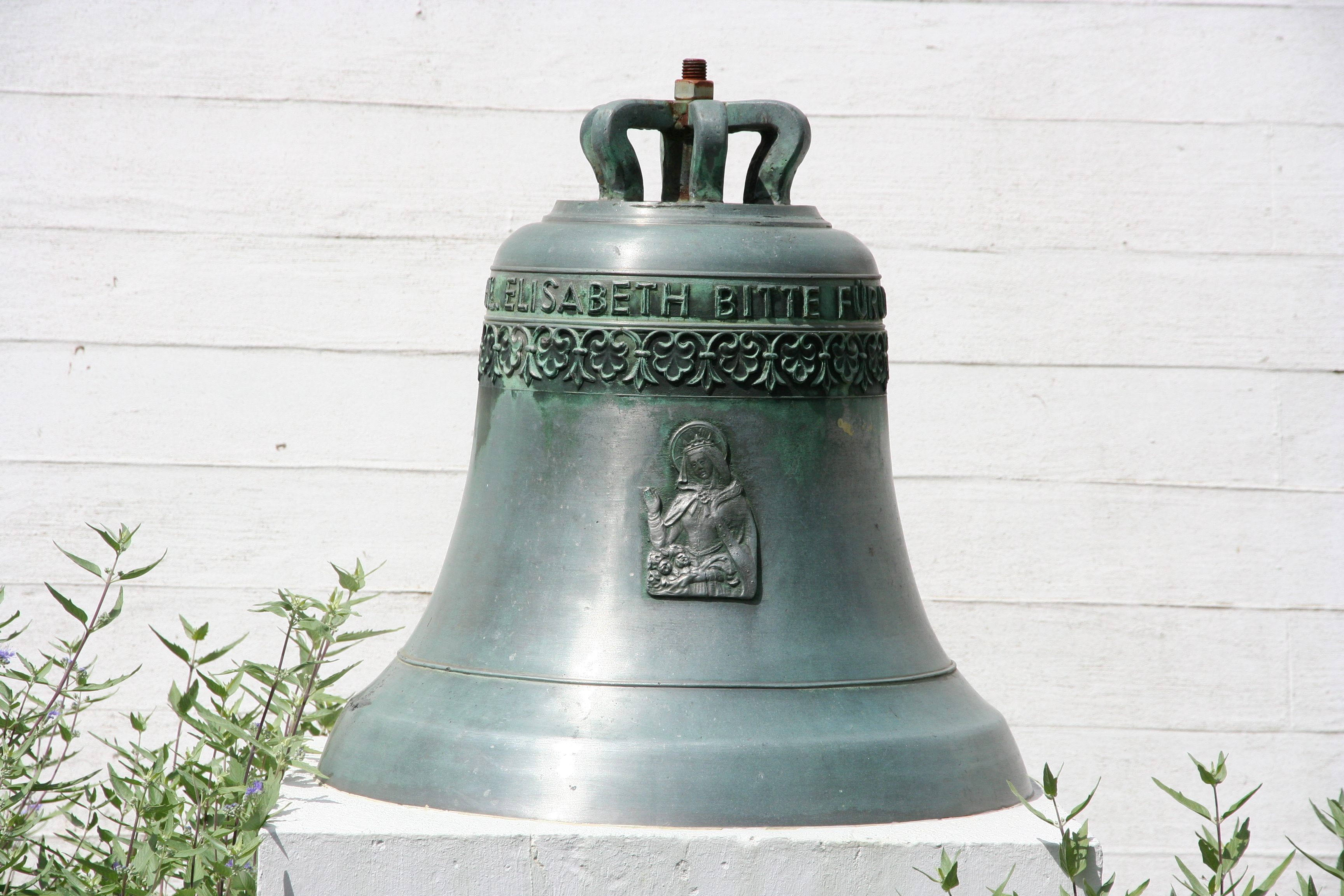 Römisch-katholische Pfarrkirche St. Elisabeth Kilchberg ZH, Glocke der Vorgängerkirche